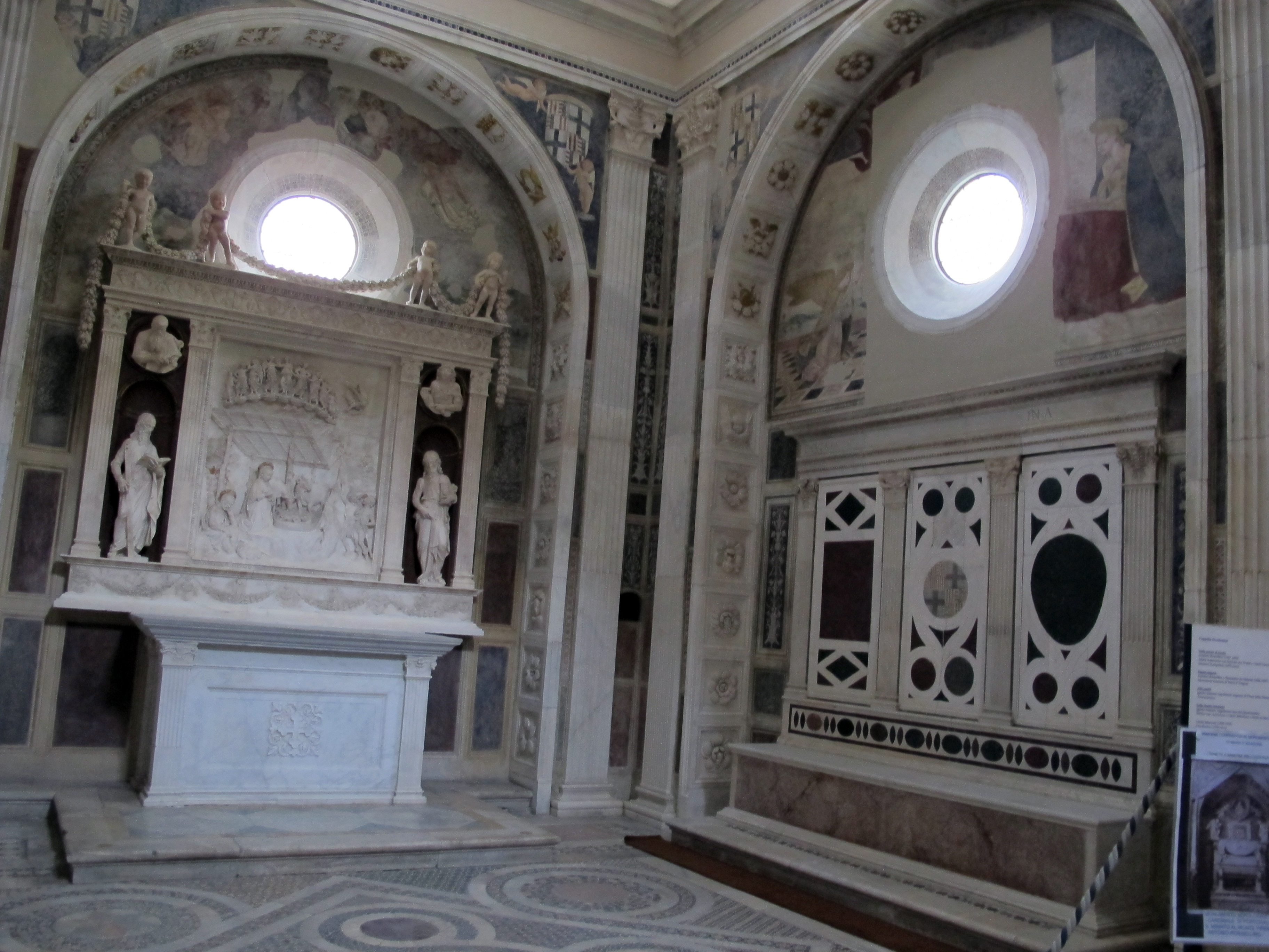 Sant'Anna dei Lombardi (Napoli) - Cappella Piccolomini